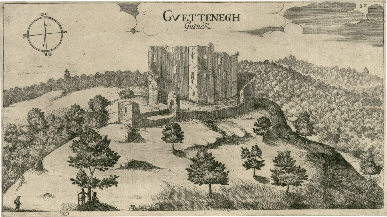 Grad Gotnik (Guettenegg)